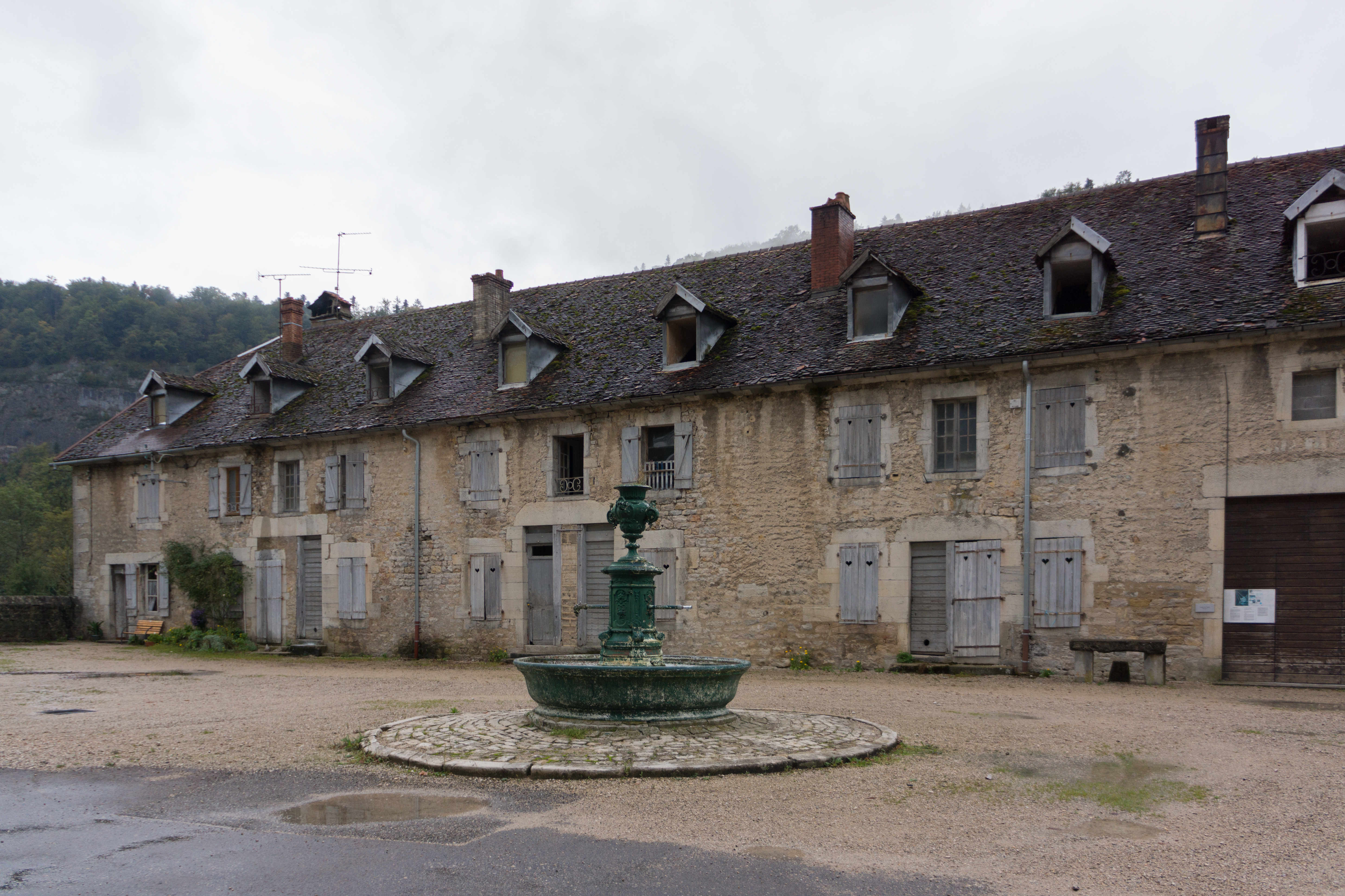 Forges de Syam, département du Jura. .